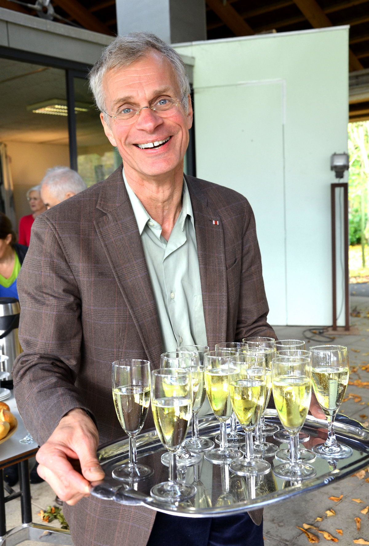 Der künstlerische Leiter des Kulturdenkmals Hermannshof in Völksen, Eckhardt Liss, servierte dem angereisten Freundeskreis Hannover persönlich einen erfrischenden Sekt auf dem Tablett ...